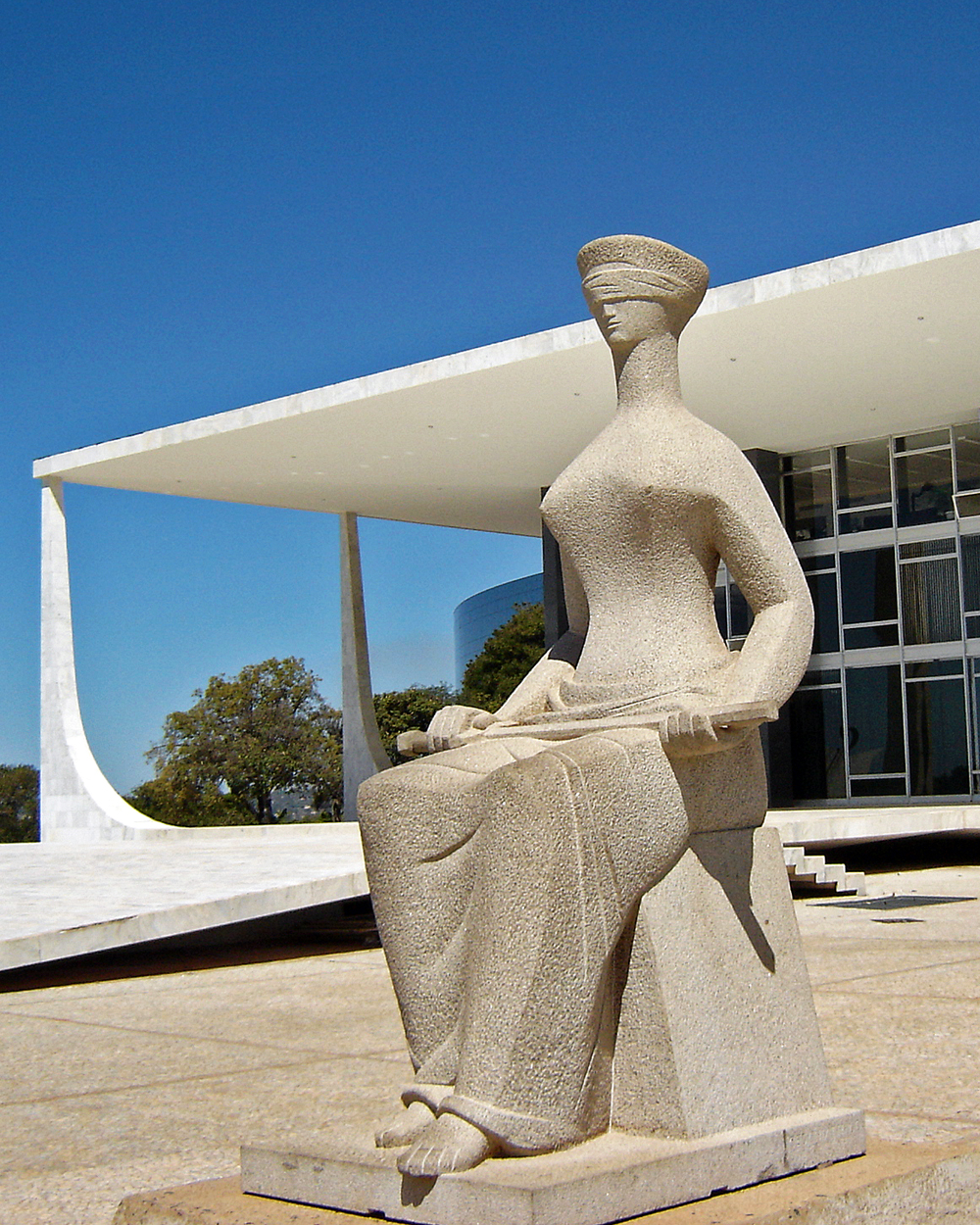 Escultura "A Justiça" em frente ao STF, Praça dos Três Poderes, Brasilia, DF, Brasil.